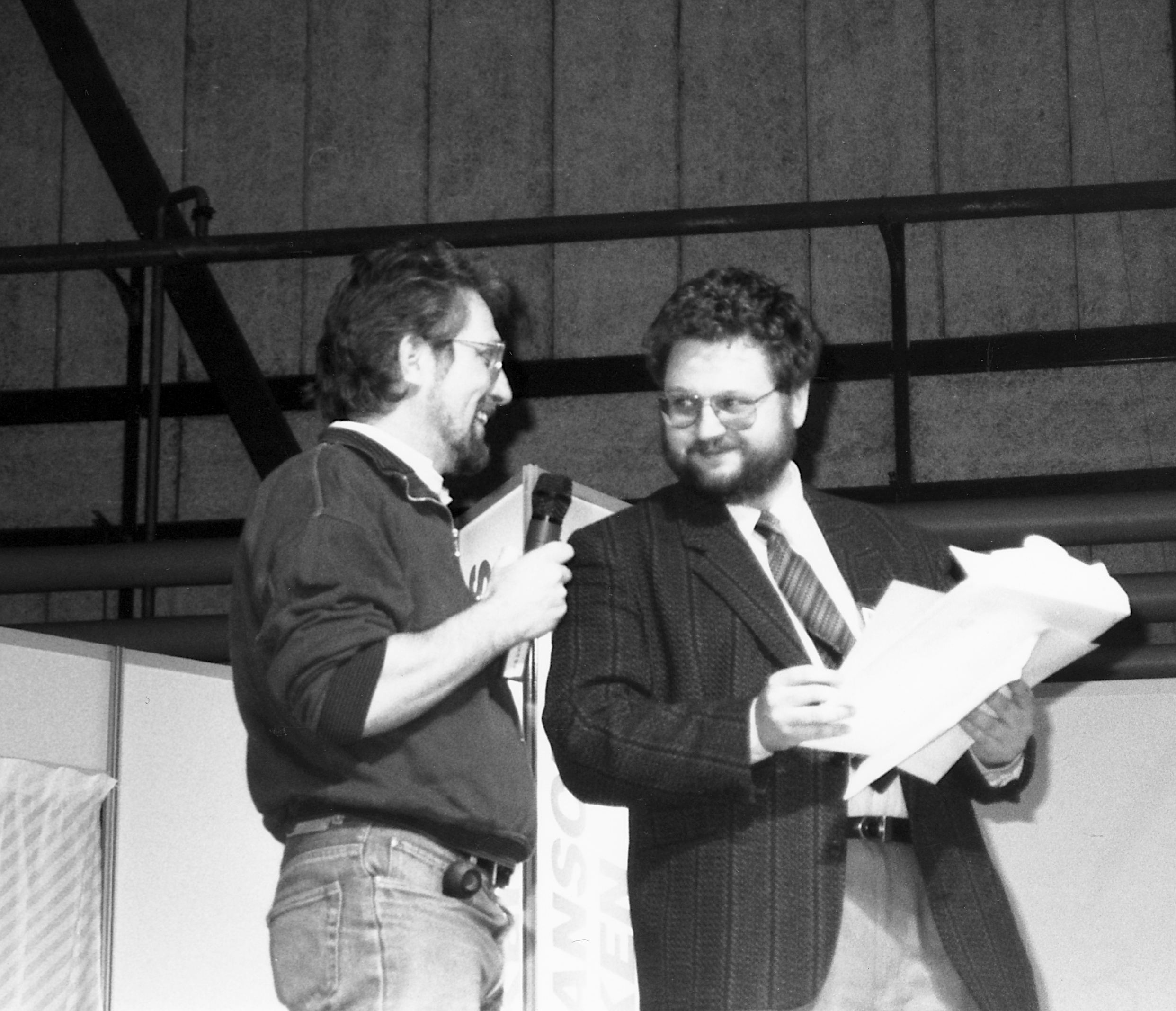 Horst Schröder och Daniel Atterbom på scenen under Serie-Expo -91 i Stockholm. Sannolikt handlar det om Thud – Serieläsarnas pris 1991.